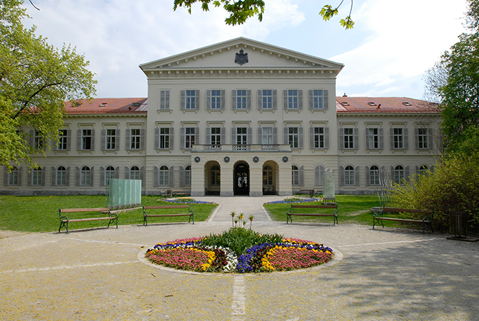 Palais Meran: Sitz der Universitätsleitung, der Stabsstellen, des Studiencenters, der Veranstaltungsabteilung und der Institute Musikästhetik, Alte Musik und Aufführungspraxis und Jazzforschung. Links (1): Skulptur zur Musik von Arnold Schönberg, zur Oper “Moses und Aron”, 1999 von Katja Cruz Rechts (2): Skulptur zur Musik von Alban Berg, “Violinkonzert”, Palais Meran Park Graz, 1998 von Katja Cruz Ganz rechts (3): Skulptur zur Musik von Anton Webern, “Symphonie op. 21”, 1999 von Katja Cruz